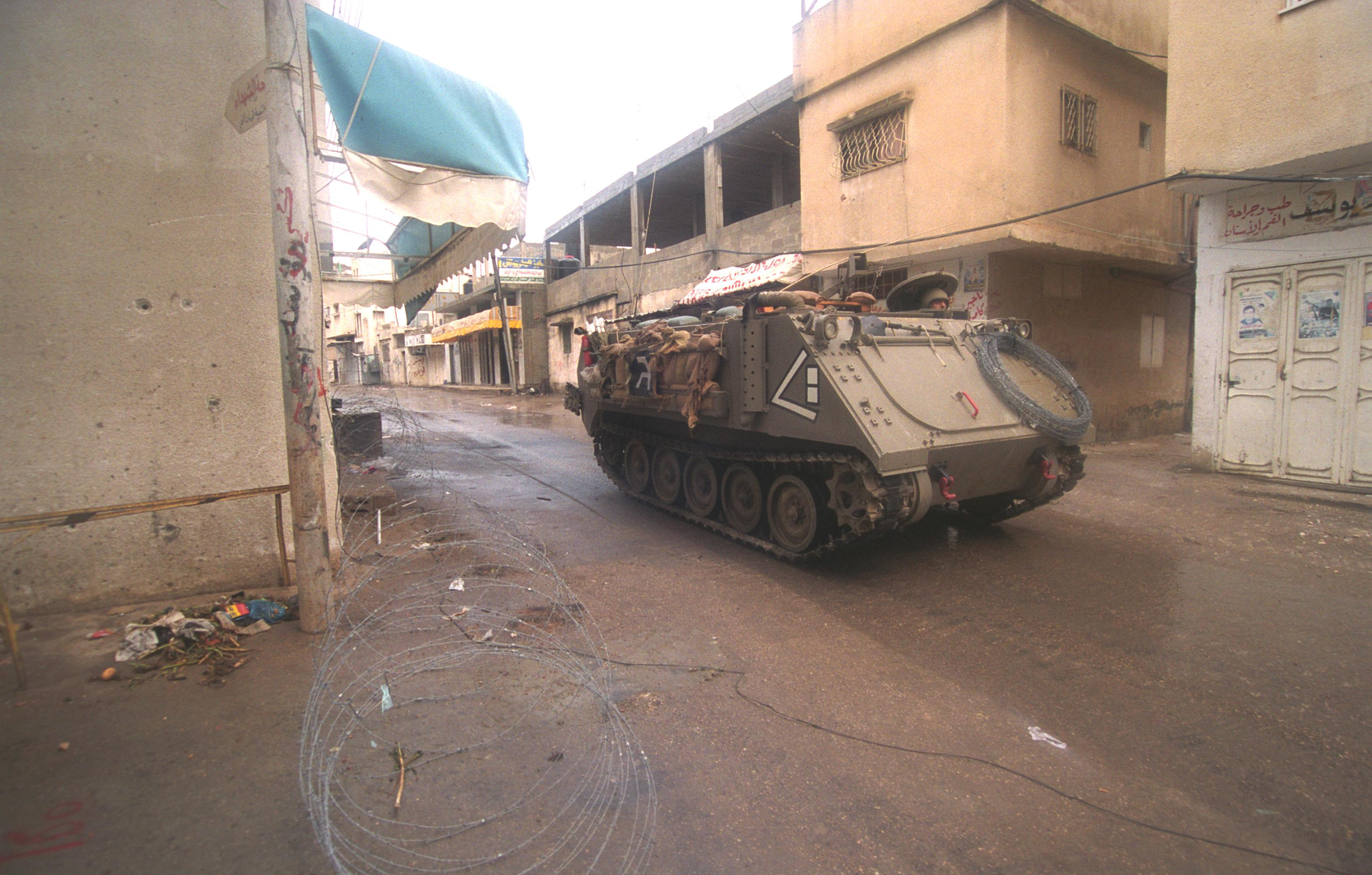 מבצע "חומת מגן" לחיסול והריסת תשתיות הטרור ברשות הפלשתינית על ידי כוחות צה"ל. בצילום, שריונית של צה"ל בפעילות מבצעית ברחובות טול כארם.